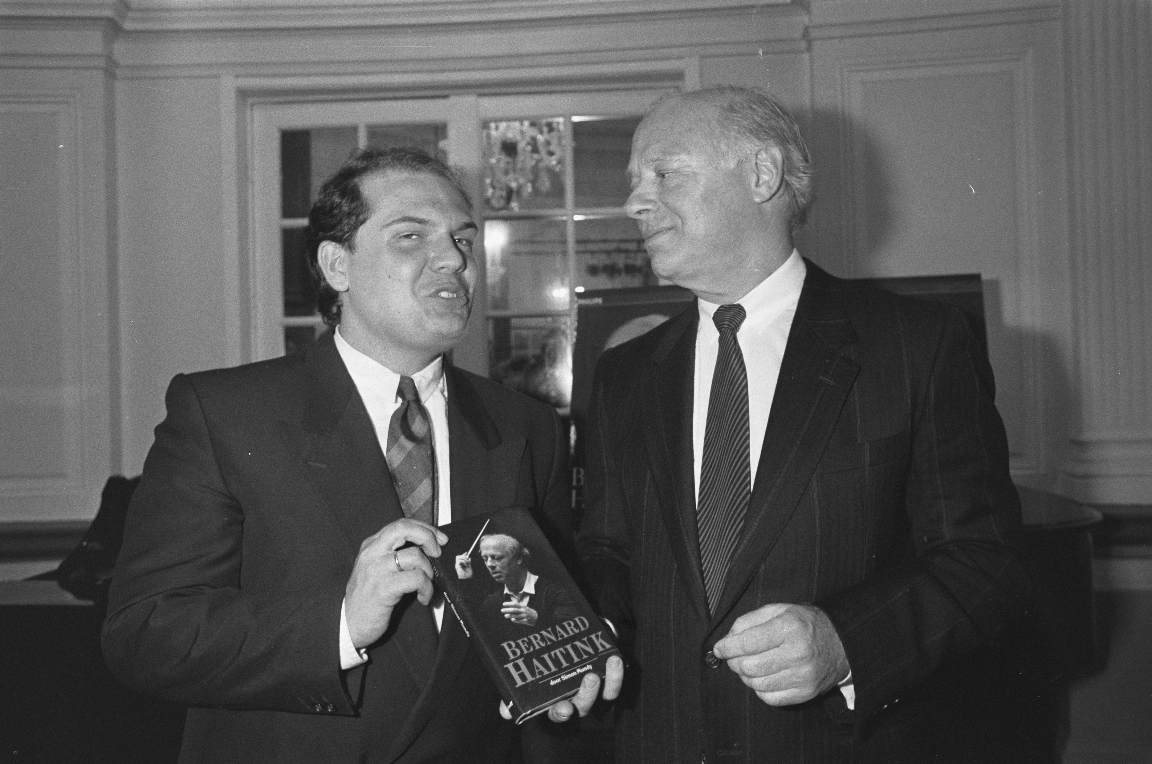 Collectie / Archief : Fotocollectie Anefo Reportage / Serie : [ onbekend ] Beschrijving : Zilveren Fonograaf voor Bernard Haitink ; nr. 5, 6: Bernard Haitink , kop, nr. 3, 4: Jaap van Zweden met Haitink (r) Datum : 12 april 1988 Trefwoorden : boeken, dirigenten Persoonsnaam : Bernard Haitink, Jaap van Zweden Fotograaf : Croes, Rob C. / Anefo Auteursrechthebbende : Nationaal Archief Materiaalsoort : Negatief (zwart/wit) Nummer archiefinventaris : bekijk toegang 2.24.01.05 Bestanddeelnummer : 934-2294